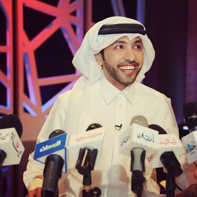 صورة لفهد الكبيسي في برنامج يا هلا في فقرة المؤتمر الصحفي